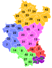 Les zones interpolice de la province belge de Luxembourg Arlon Attert Aubange Bastogne Bertogne Bertrix Bouillon Chiny Daverdisse Durbuy Érezée Étalle Fauvillers Florenville Gouvy Habay Herbeumont Hotton Houffalize La Roche-en-Ardenne Léglise Libin Libramont-Chevigny Manhay Marche-en-Famenne Martelange Meix-devant-Virton Messancy Musson Nassogne Neufchâteau Paliseul Rendeux Rouvroy Sainte-Ode Saint-Hubert Saint-Léger Tellin Tenneville Tintigny Vaux-sur-Sûre Vielsalm Virton Wellin